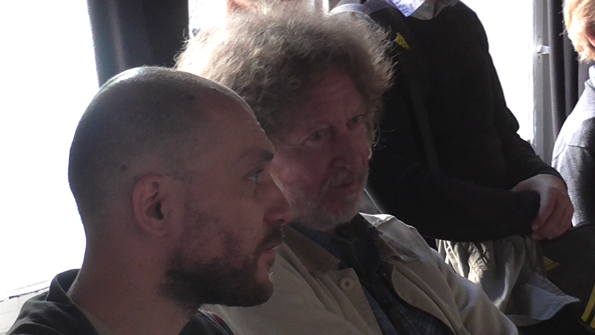 FORMANEK Csapa és ZALÁN Tibor rendezők, színházi szakemberek a Magyar Művek Szemléjén, 2015-ben